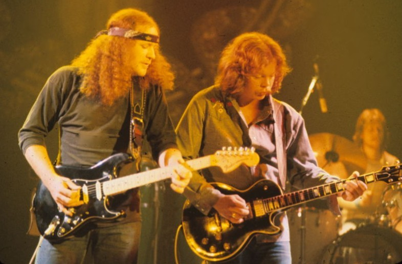 New Haven, CT